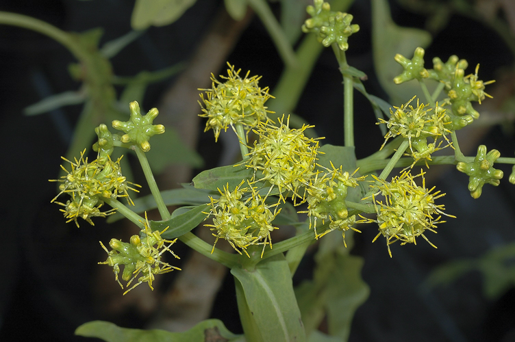 Flore de Juan Fernandez Thamnoseris lacerata, une espèce endémique de l'île de San Ambrosio qui fait partie des îles Desventuradas